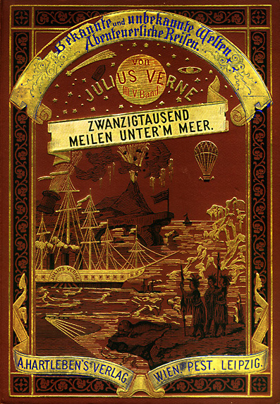 Zwanzigtausend Meilen unter’m Meer, erste deutsche Buchausgabe aus dem Jahr 1874 in der von 1873 und 1891 bei A. Hartleben’s Verlag erschienene Reihe Bekannte und unbekannte Welten. Abenteuerliche Reisen.